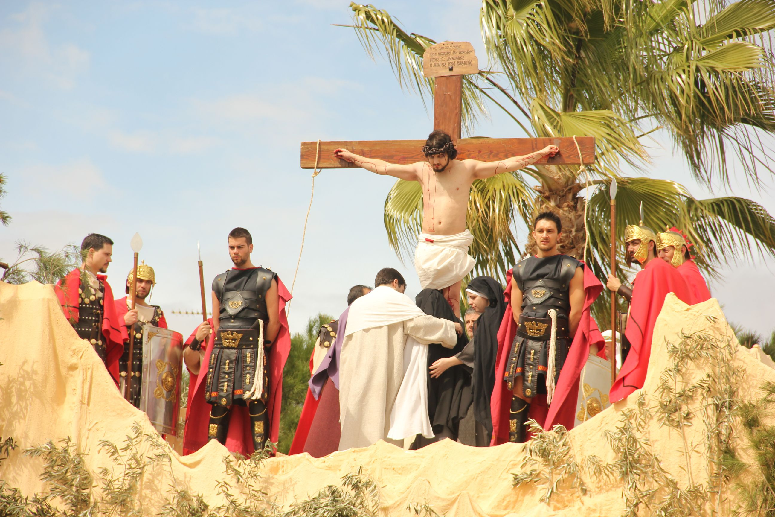 Crucifixión de Benetússer